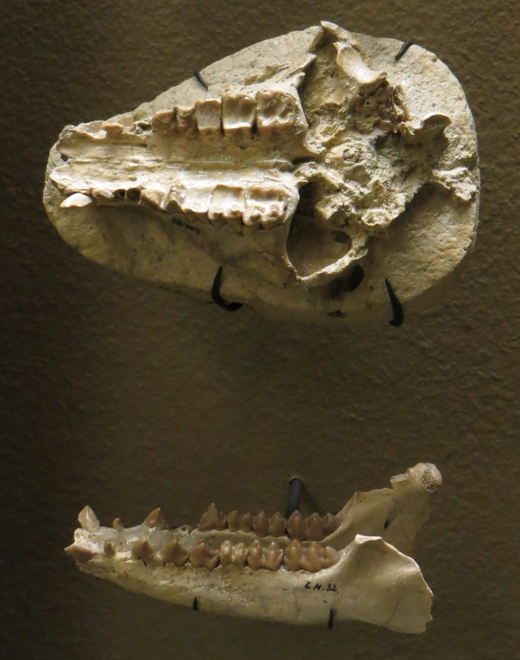 Fossil of Anthracotherium- Took the picture at Natural History Museum, Basel